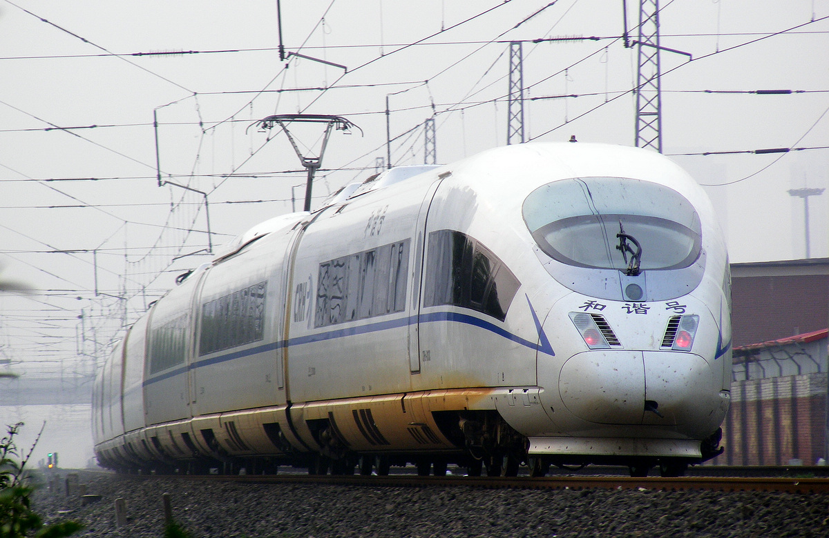 中文（中国大陆）: CRH3C在津山普速线上